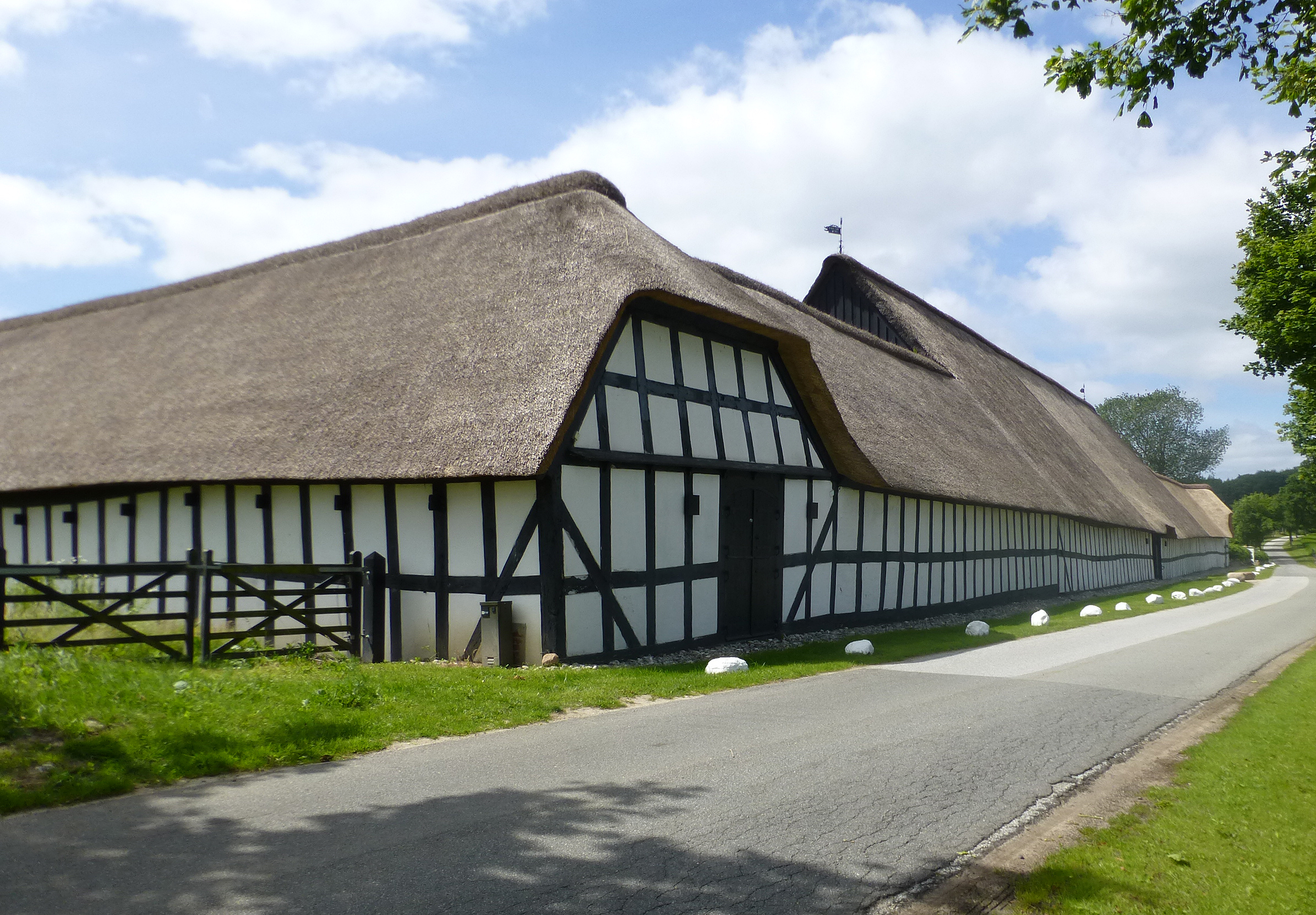 Lyngsbæk Hovedgaard på Mols; Ladegården